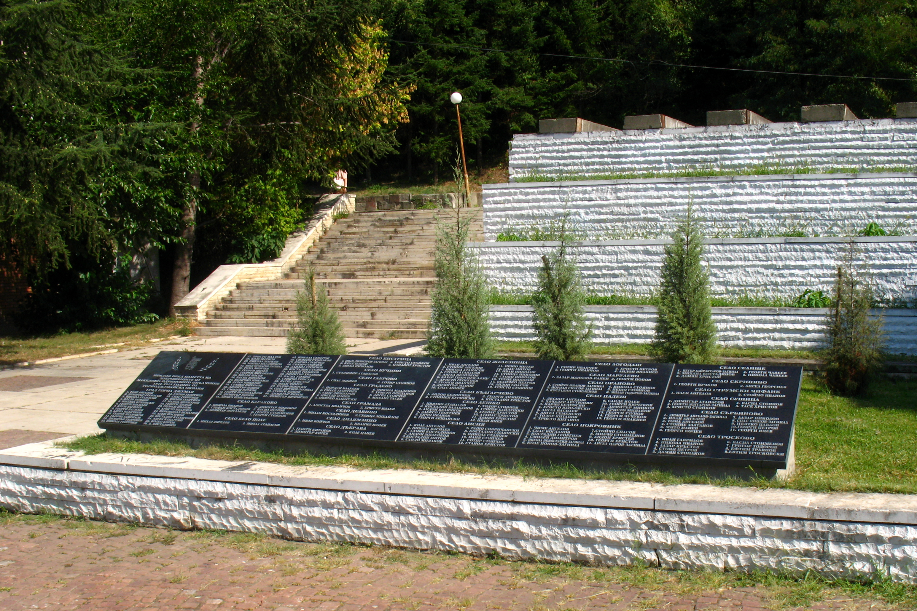 Паметник на Македоно-одринското опълчение в Благоевград, България.